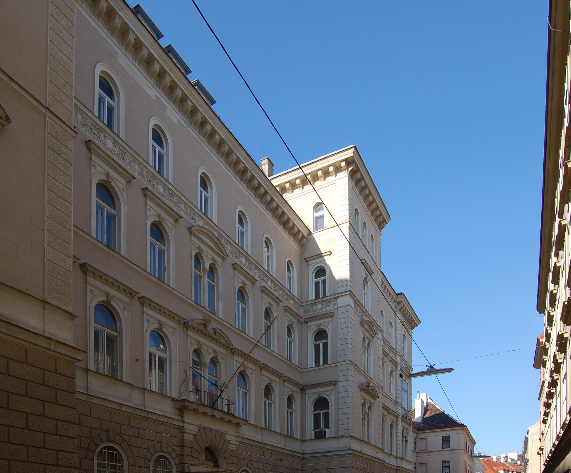 Das denkmalgeschützte Gebäude in der Schmidgasse 12-14 in Wien-Josefstadt.